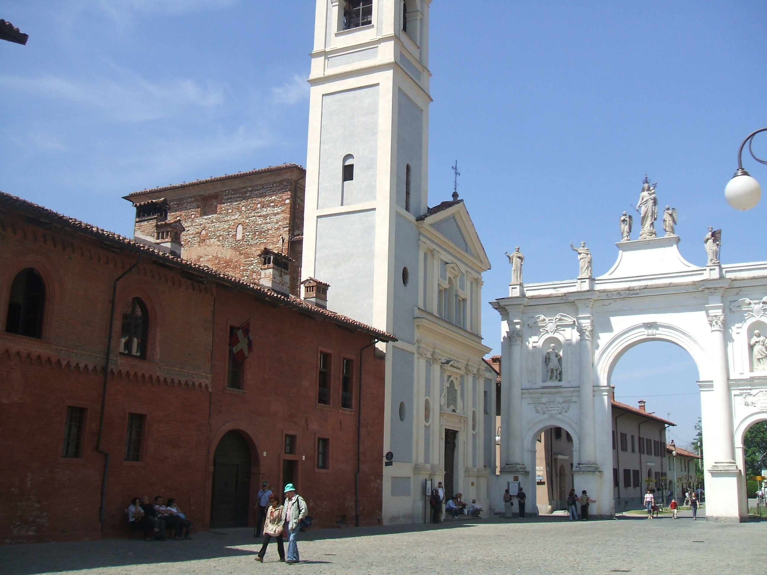 Cherasco, porta del belvedere